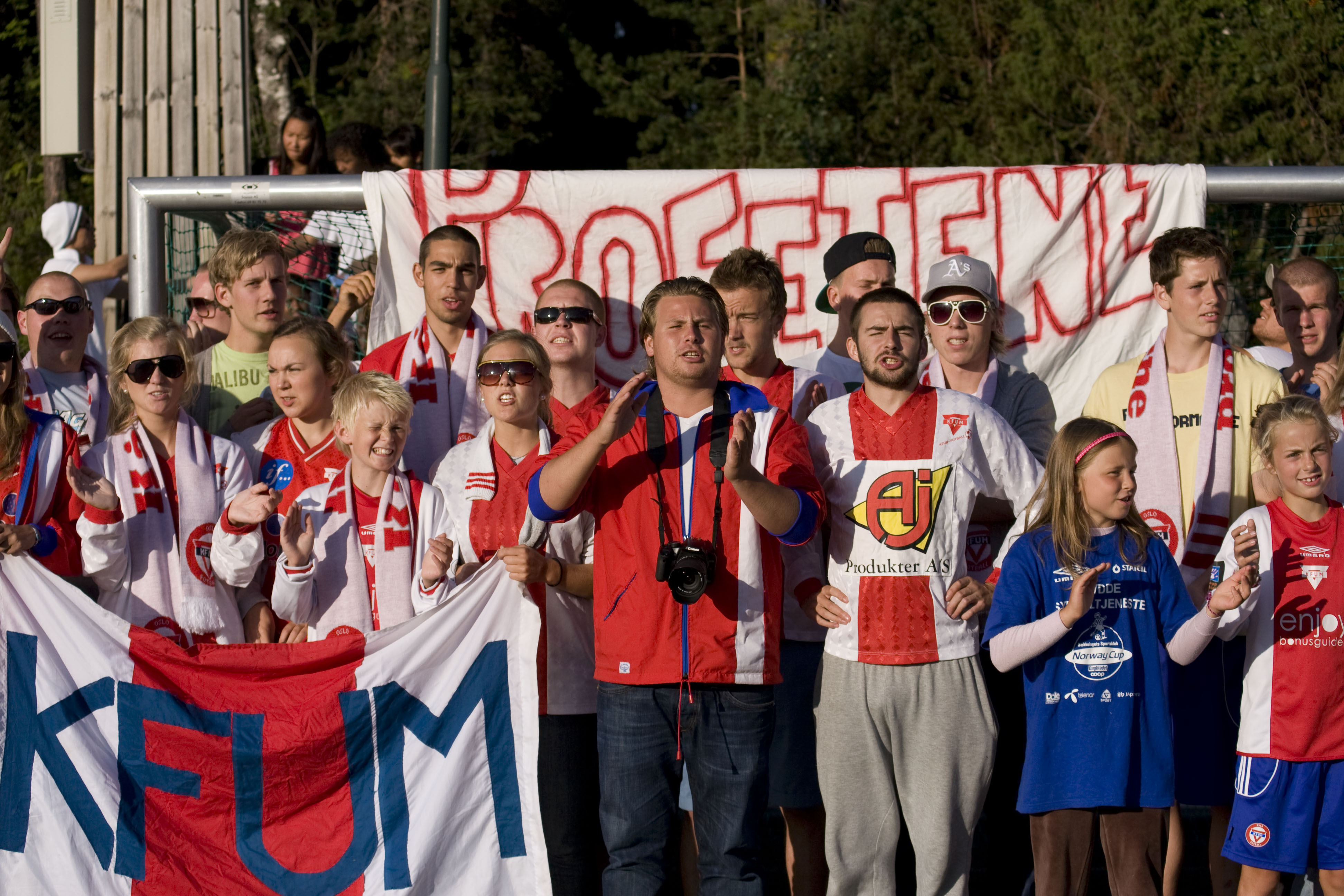 Profetene under Norway Cup 2009.